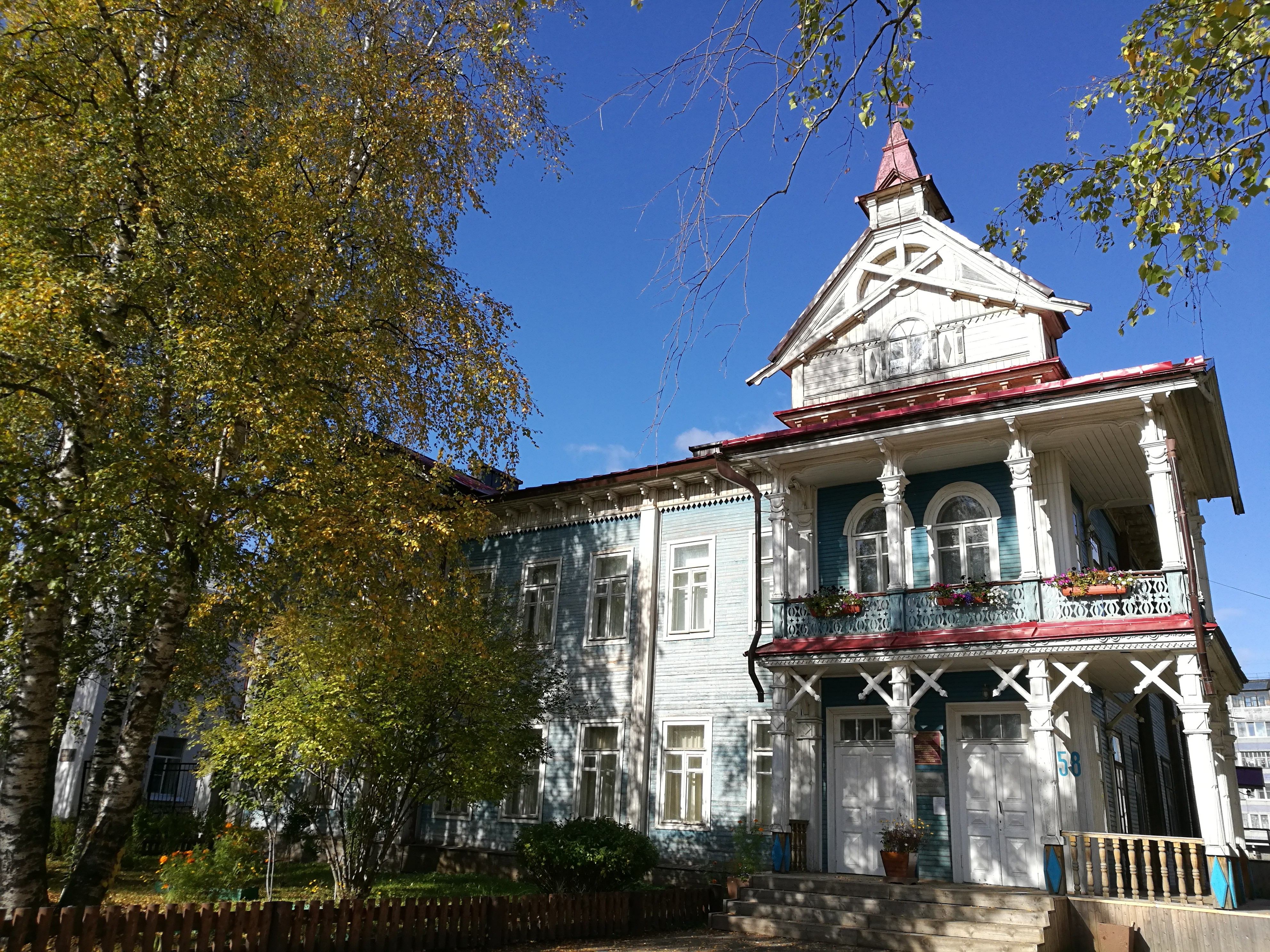 Училище начальное земское: улица Д. Каликовой, 58, Выльгорт, Сыктывдинский район, республика Коми